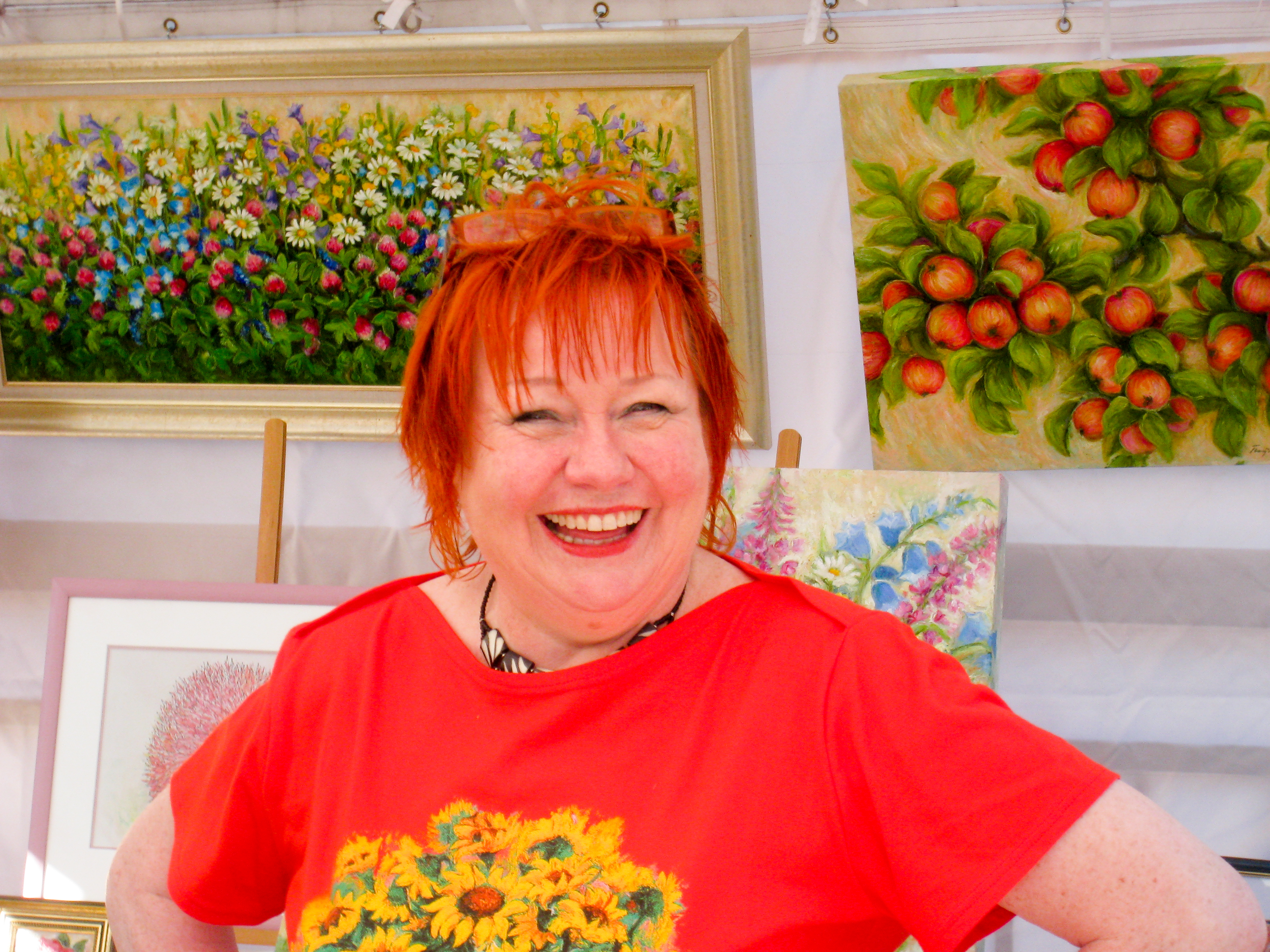 Tuija Piepponen